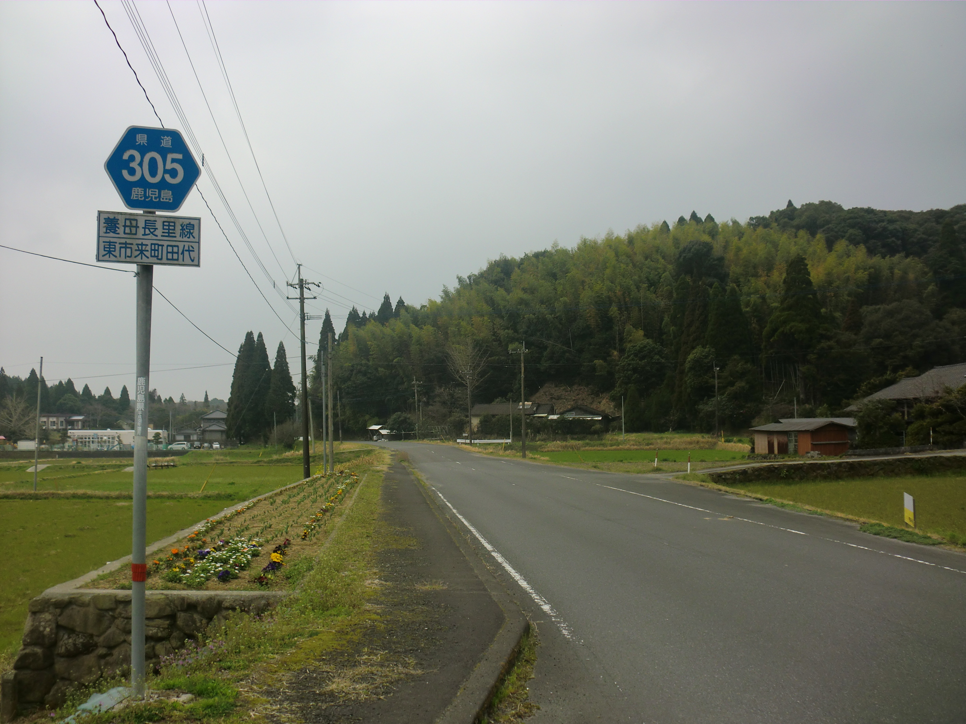 鹿児島県道305号養母長里線。日置市で撮影。